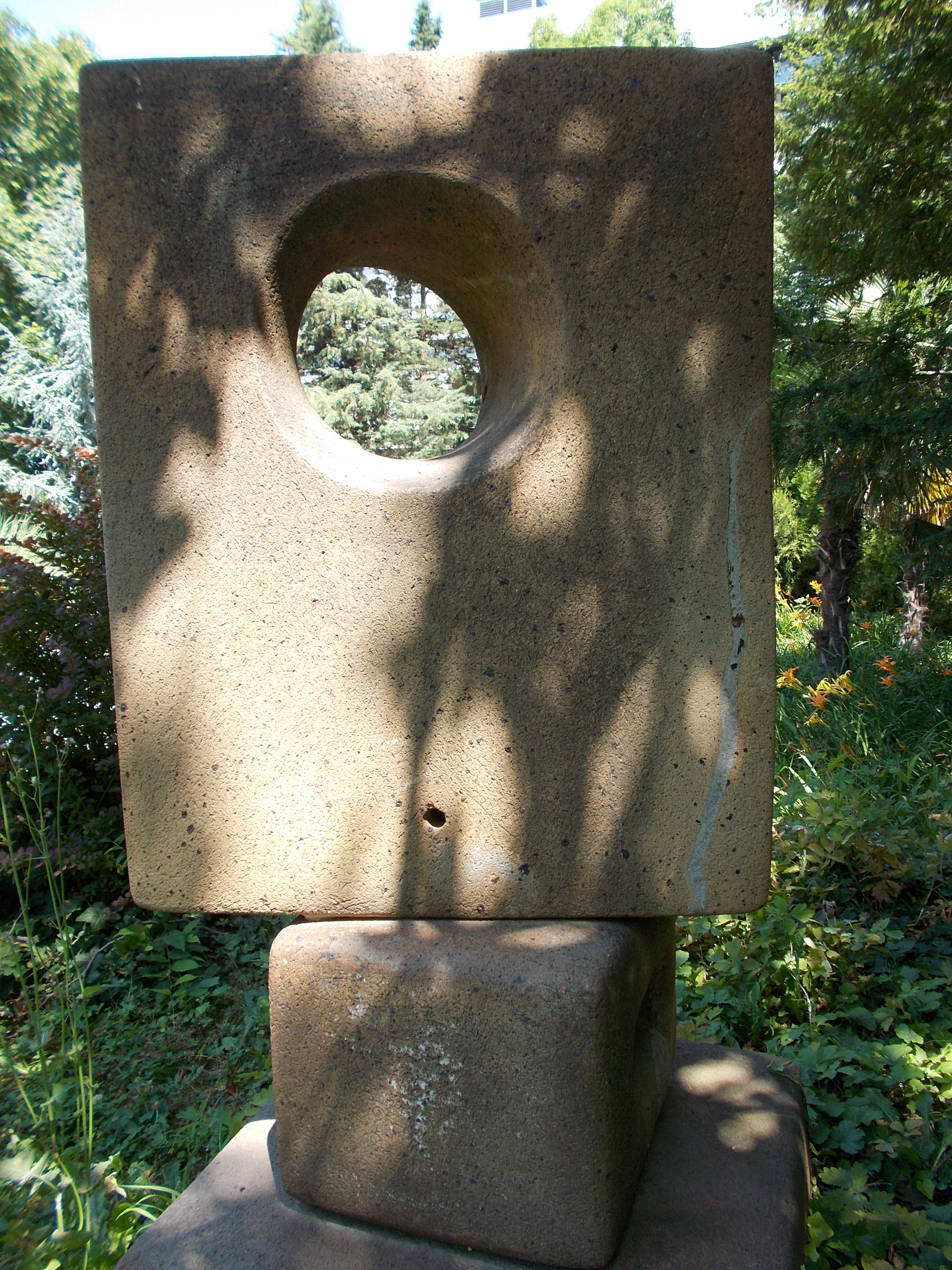 Lyuk. Nonfiguratív-szobor (Szabady Veronika, 1969) Pálmafák és örökzöldek kertje. A Grand Hoteltől délre. - Magyarország, Budapest, Margitsziget